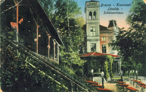 Schutzenhaus, Kronstadt